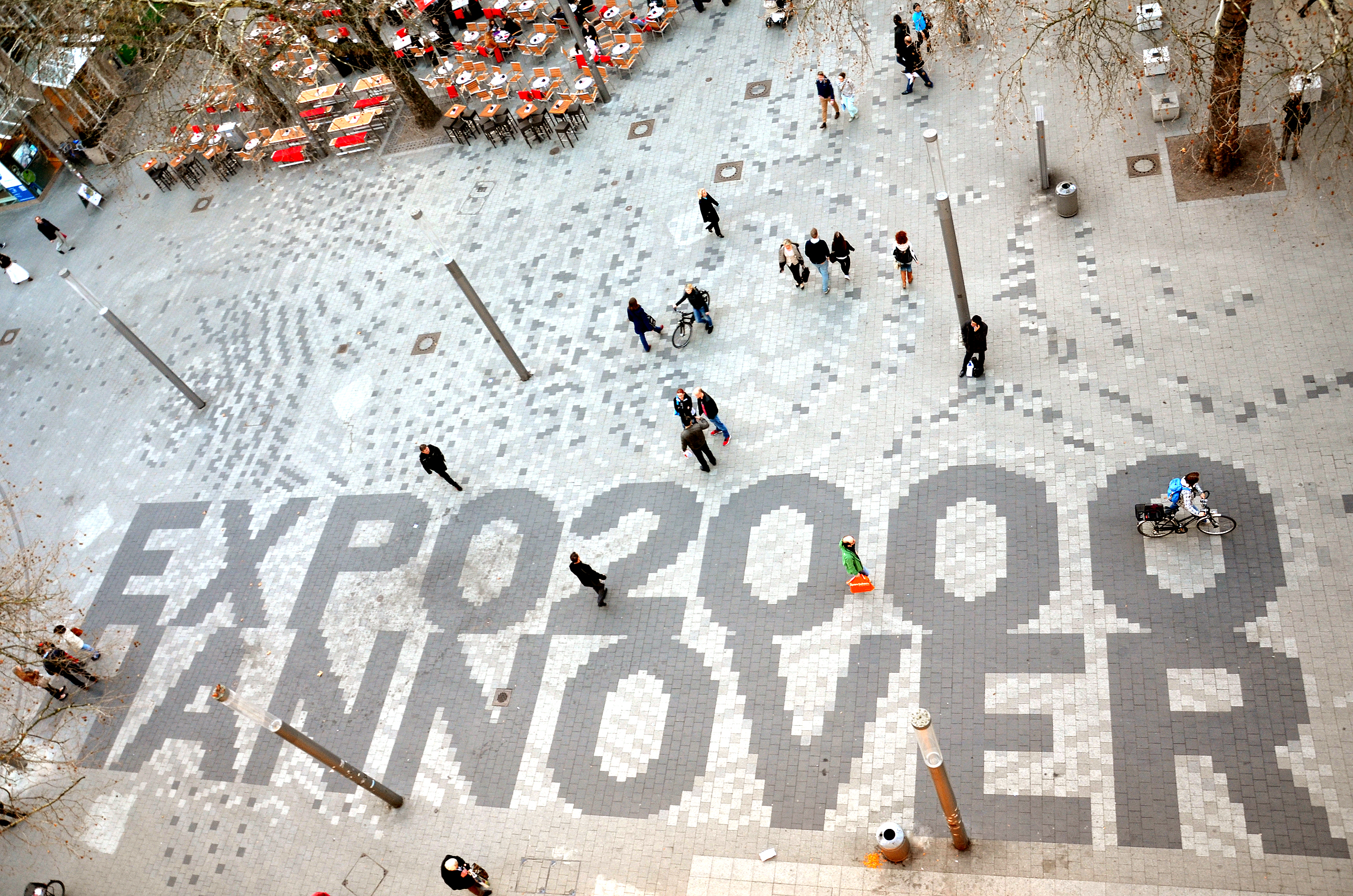 Das Schmuckpflaster mit dem Schriftzug der Expo 2000, hier gesehen vom Balkon vom Mäntelhaus Kaiser, wurde erst 2008 am Platz der Weltausstellung verlegt an der Kreuzung der Karmarschstraße mit der Osterstraße ...